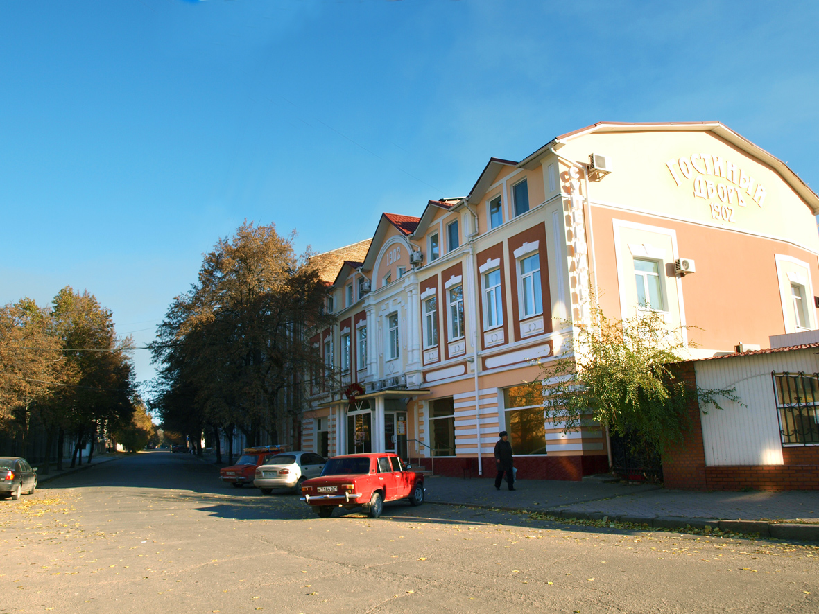 Улица Ленина.